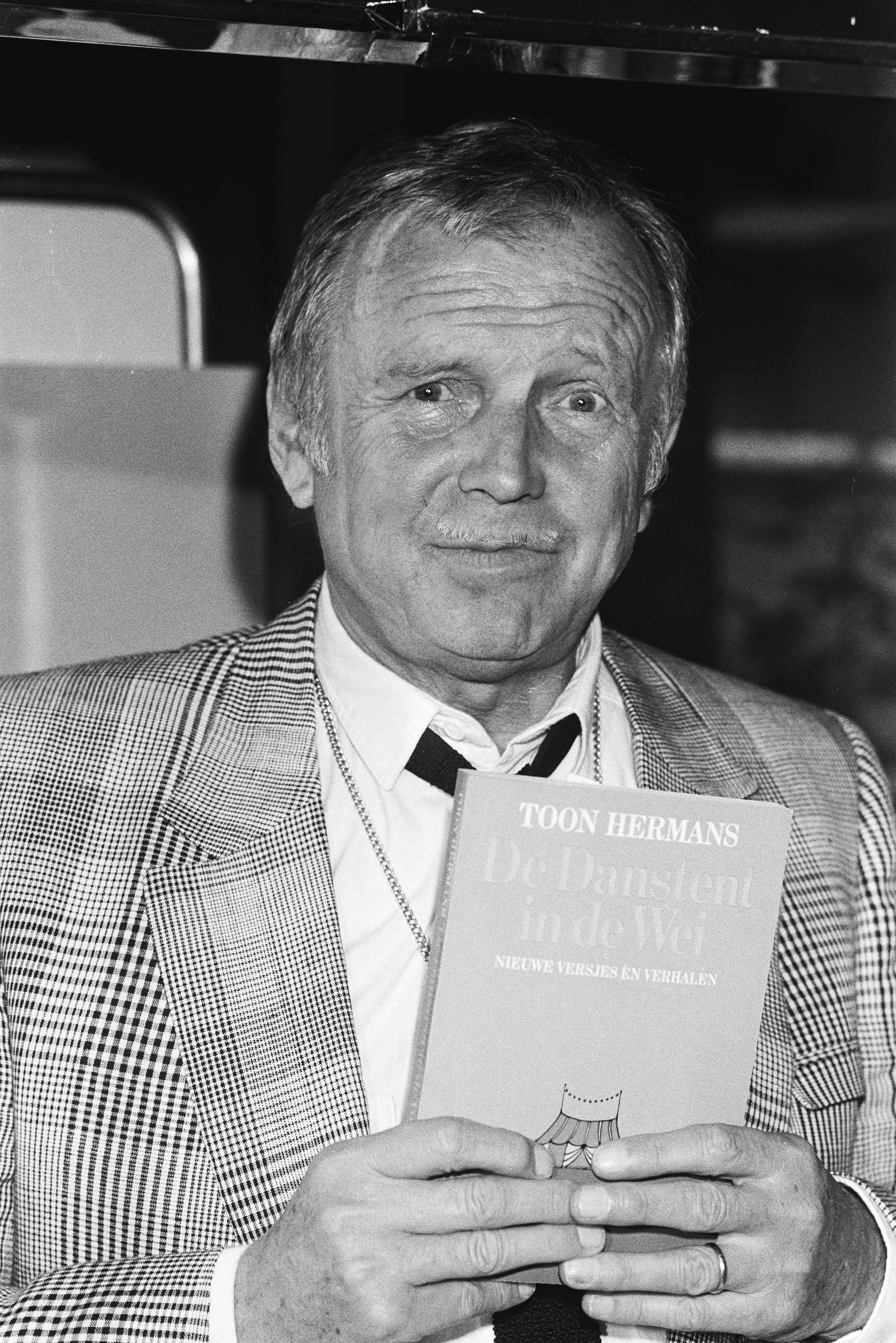 Collectie / Archief : Fotocollectie Anefo Reportage / Serie : Toon Hermans in de Bijenkorf in Amsterdam ter gelegenheid van het 100.000e exemplaar van zijn boek Beschrijving : cabaretiers, portretten, boeken, schrijvers Datum : 24 maart 1983 Locatie : Amsterdam, Noord-Holland Trefwoorden : boeken, cabaretiers, portretten, schrijvers Persoonsnaam : Hermans, Toon Fotograaf : Croes, Rob C. / Anefo Auteursrechthebbende : Nationaal Archief Materiaalsoort : Negatief (zwart/wit) Nummer archiefinventaris : bekijk toegang 2.24.01.05 Bestanddeelnummer : 932-5441